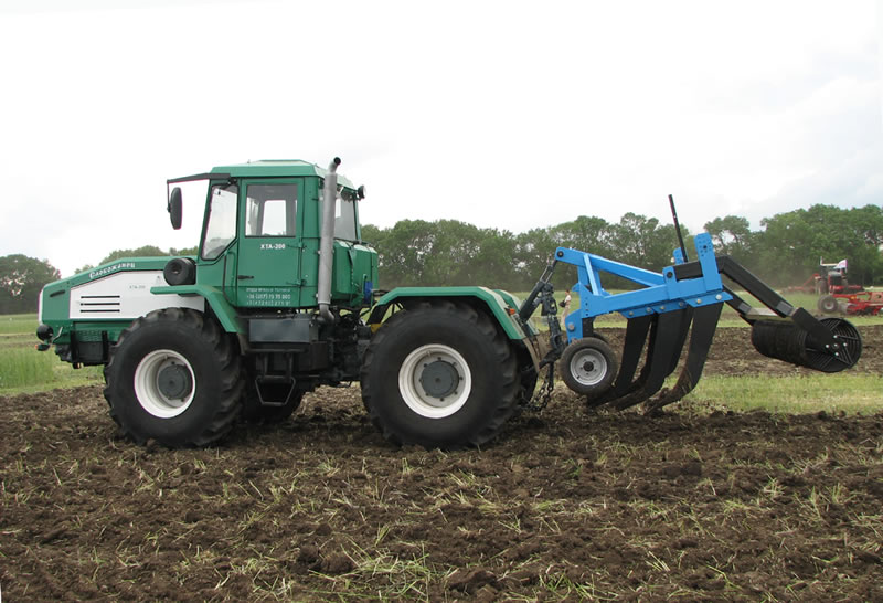 Трактор ХТА-200 серии "Слобожанец" с глубокорыхлителем ПЧГ-3.